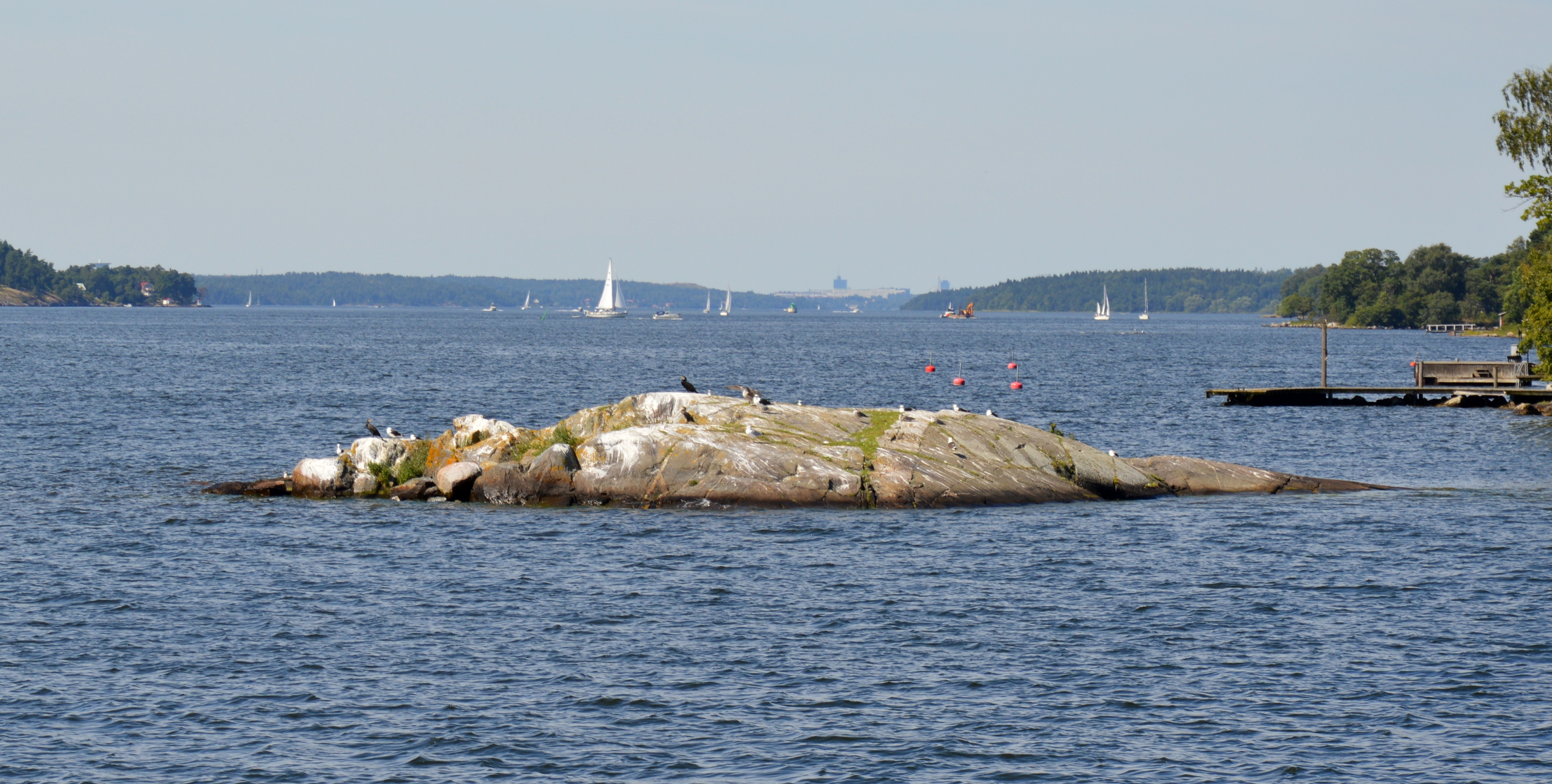 Kalvhuvudet